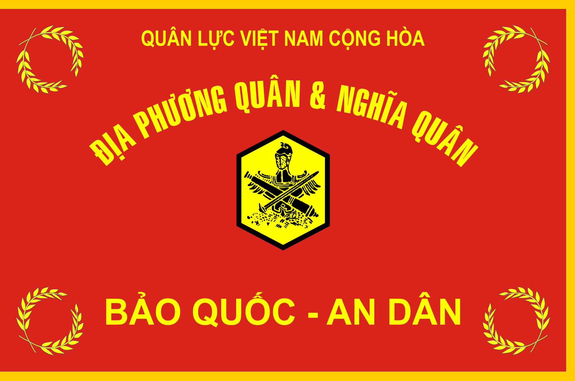 The flag of the ARVN Regional Force and Popular Force Battalion, used since 1962 to 1975.